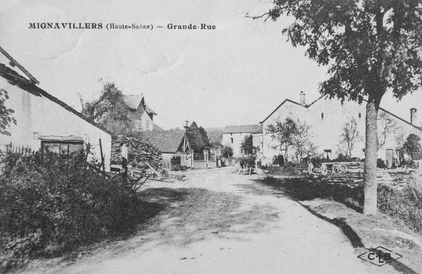 Le village de Mignavillers.